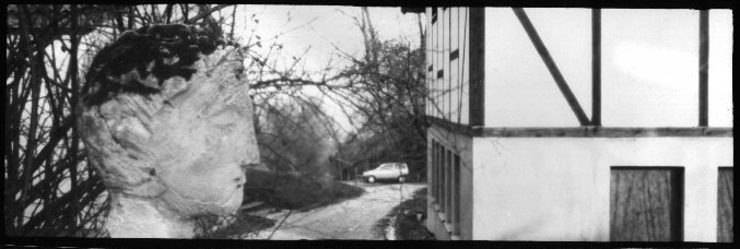 (lochkamera-eigenbau aus sperrholz) 20 min belichtet; lochblende 0,3 mm originalmaße: 23 x 8 cm